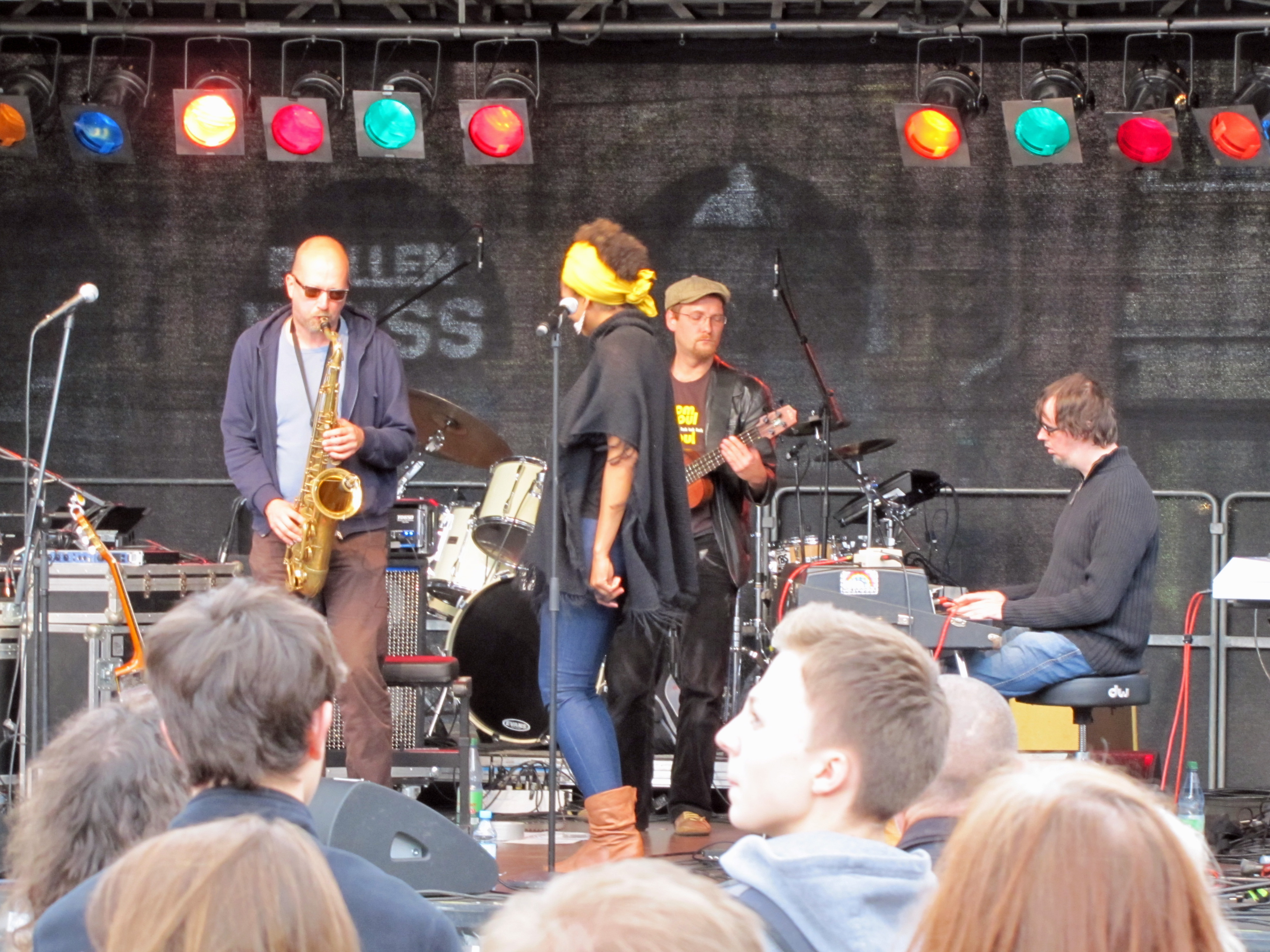 Tok Tok Tok, 2012 bei Jazz zum Dritten auf dem Römerberg in Ffm.